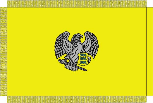 Kaitseliit flag reverse